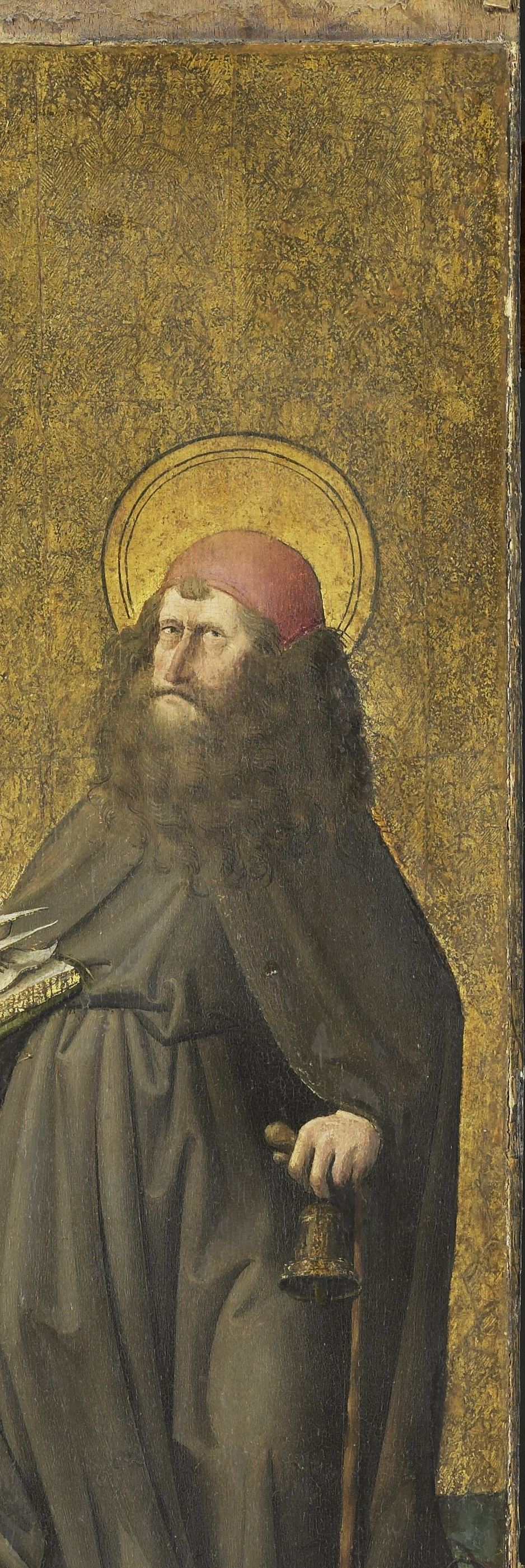 De heilige Antonius abt, staande ten voeten uit, bij zijn voeten een zwijntje. Rechter zijpaneel van een altaarstuk. Pendant van SK-A-3311.